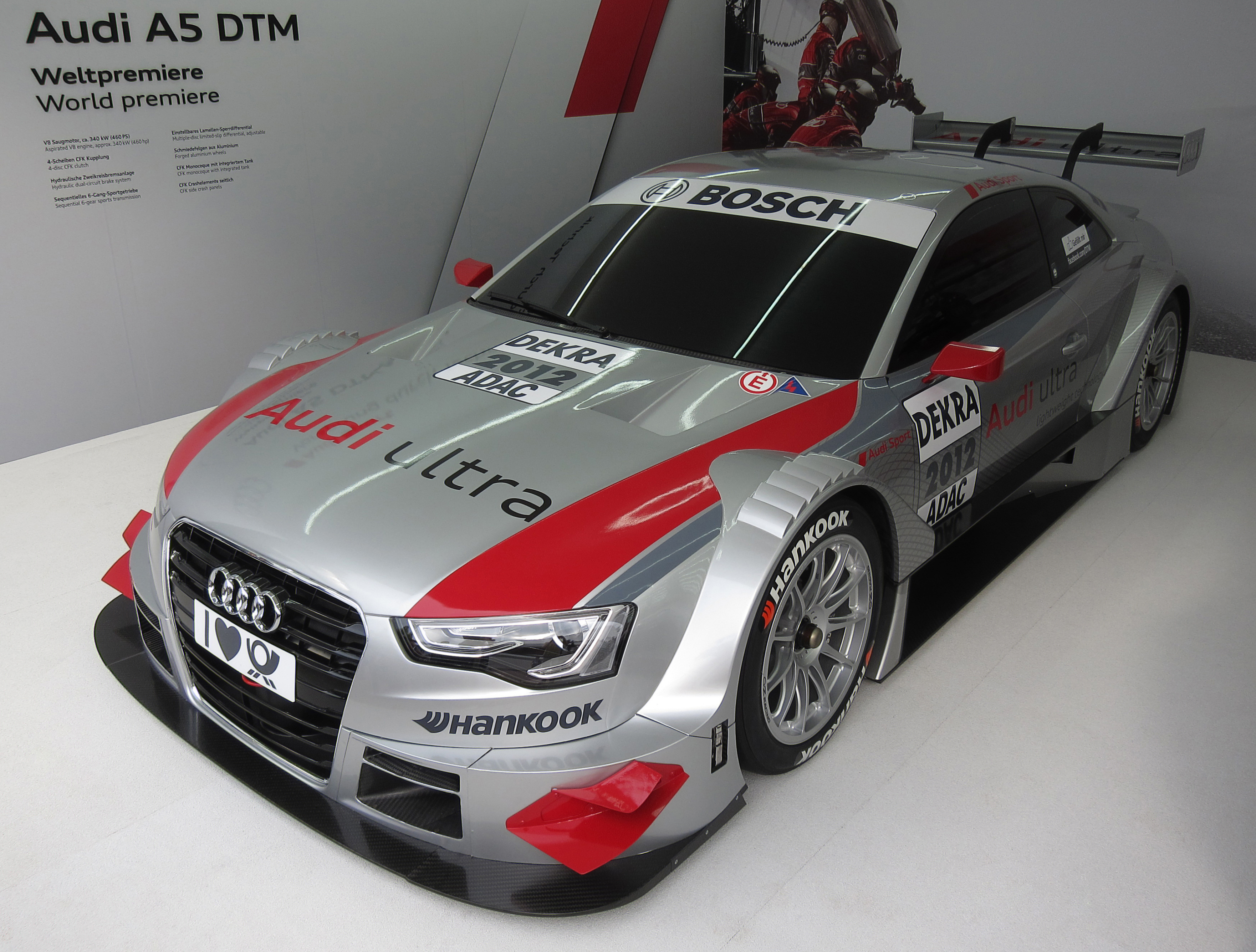 Audi A5 DTM 2012 bei der Internationalen Automobil-Ausstellung (IAA) in Frankfurt am Main. Das zweitürige Coupé ist mit einer Leistung von etwa 340 kW (460 PS) der neue Tourenwagen von Audi für die DTM-Saison 2012.